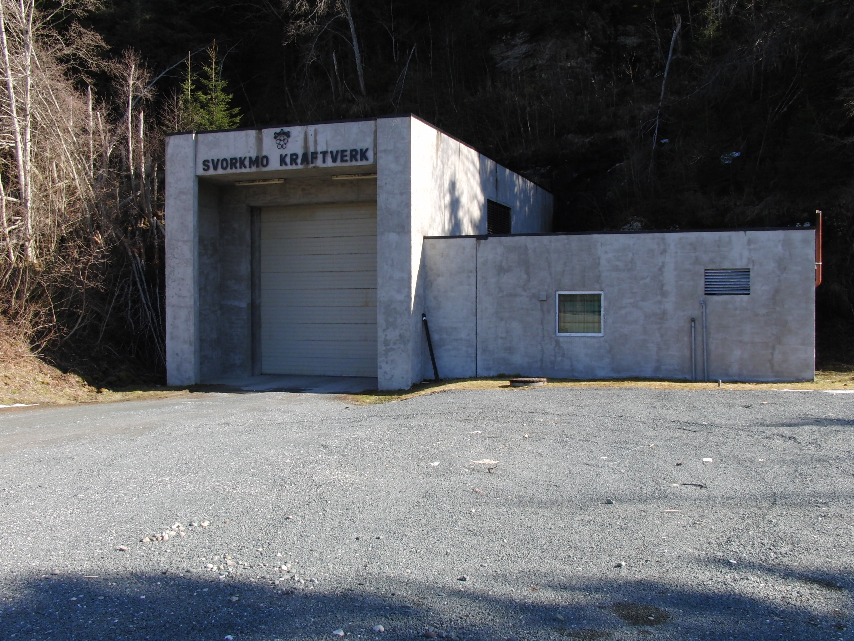 Svorkmo kraftverk